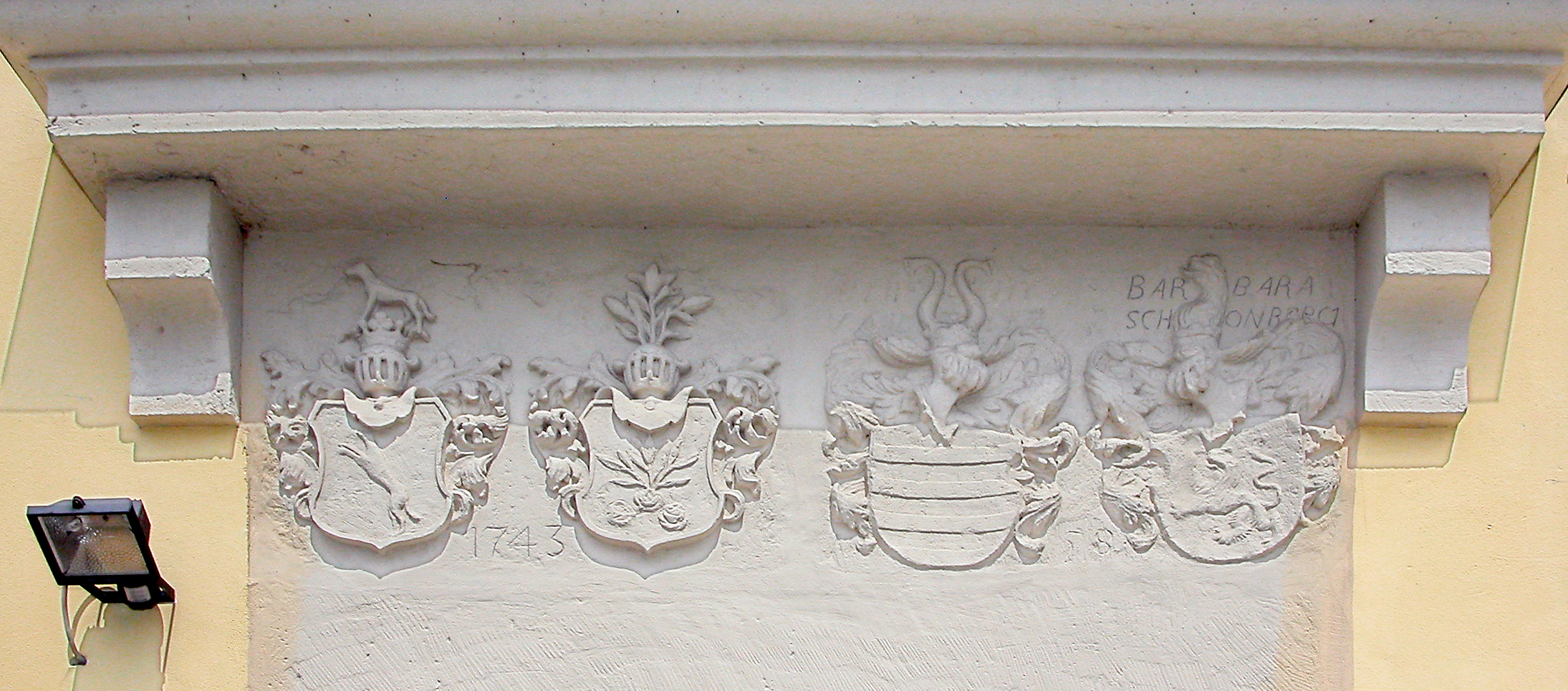 Herrenhaus Obermunzig (Munzig, Gemeinde Klipphausen)